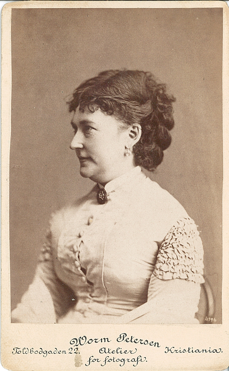 Skuespiller Laura Gundersen portrettert av fotograf Severin Worm-Petersen ca. 1880-1885. Bildet tilhører Oslo bymuseum og er lagt ut på